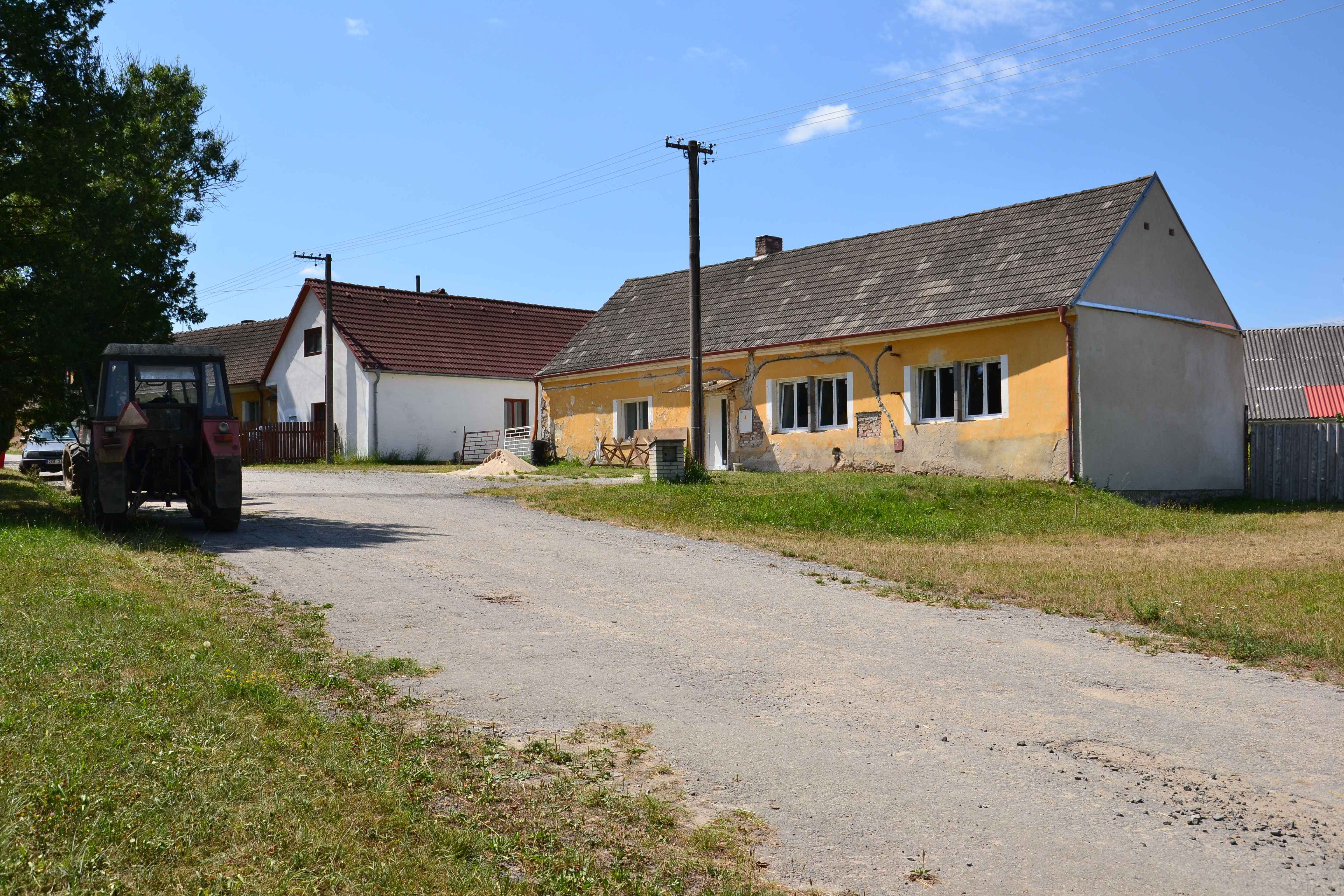 Náves